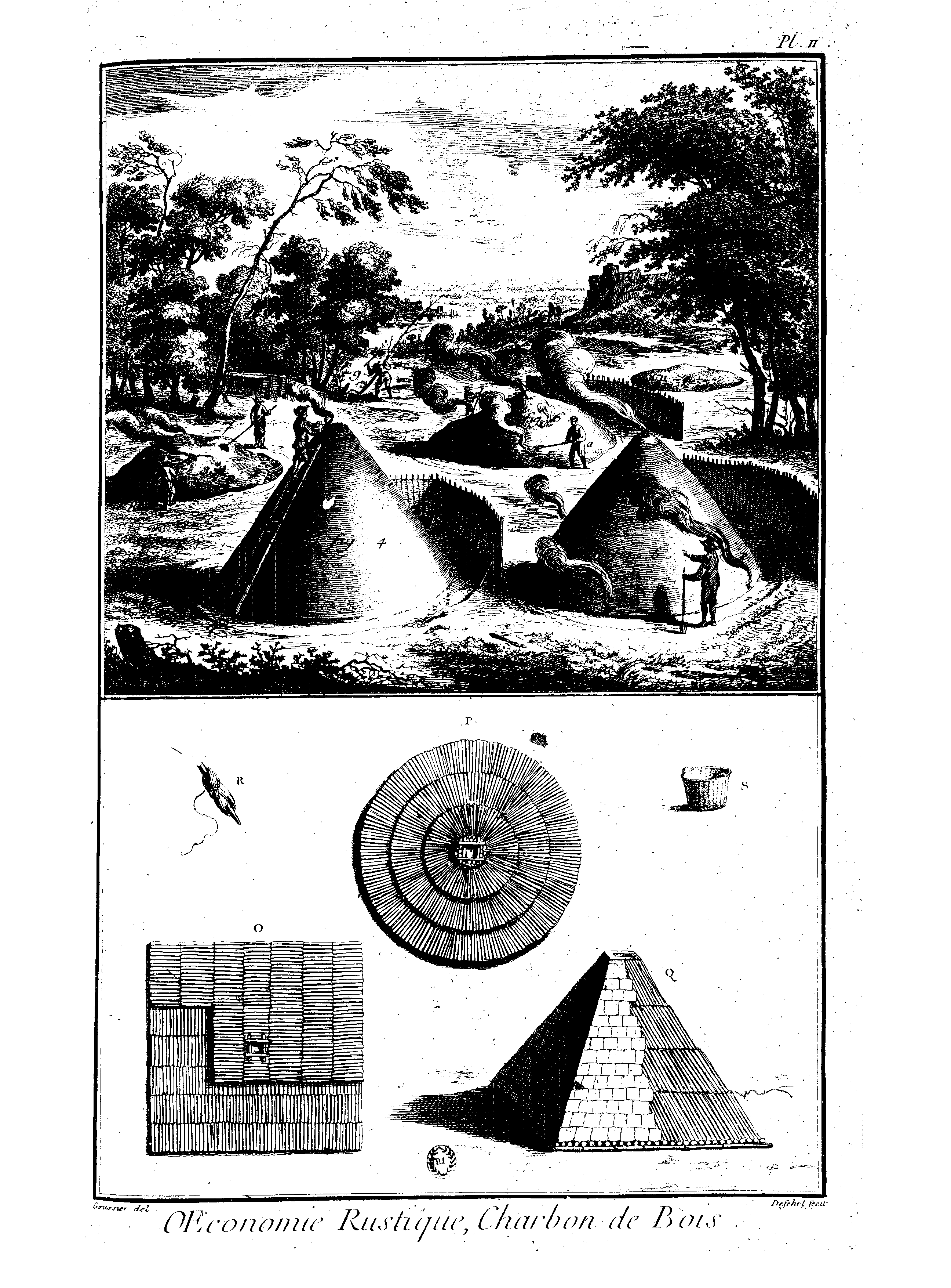 Planches de l'Encyclopédie de Diderot et d'Alembert, volume 1.